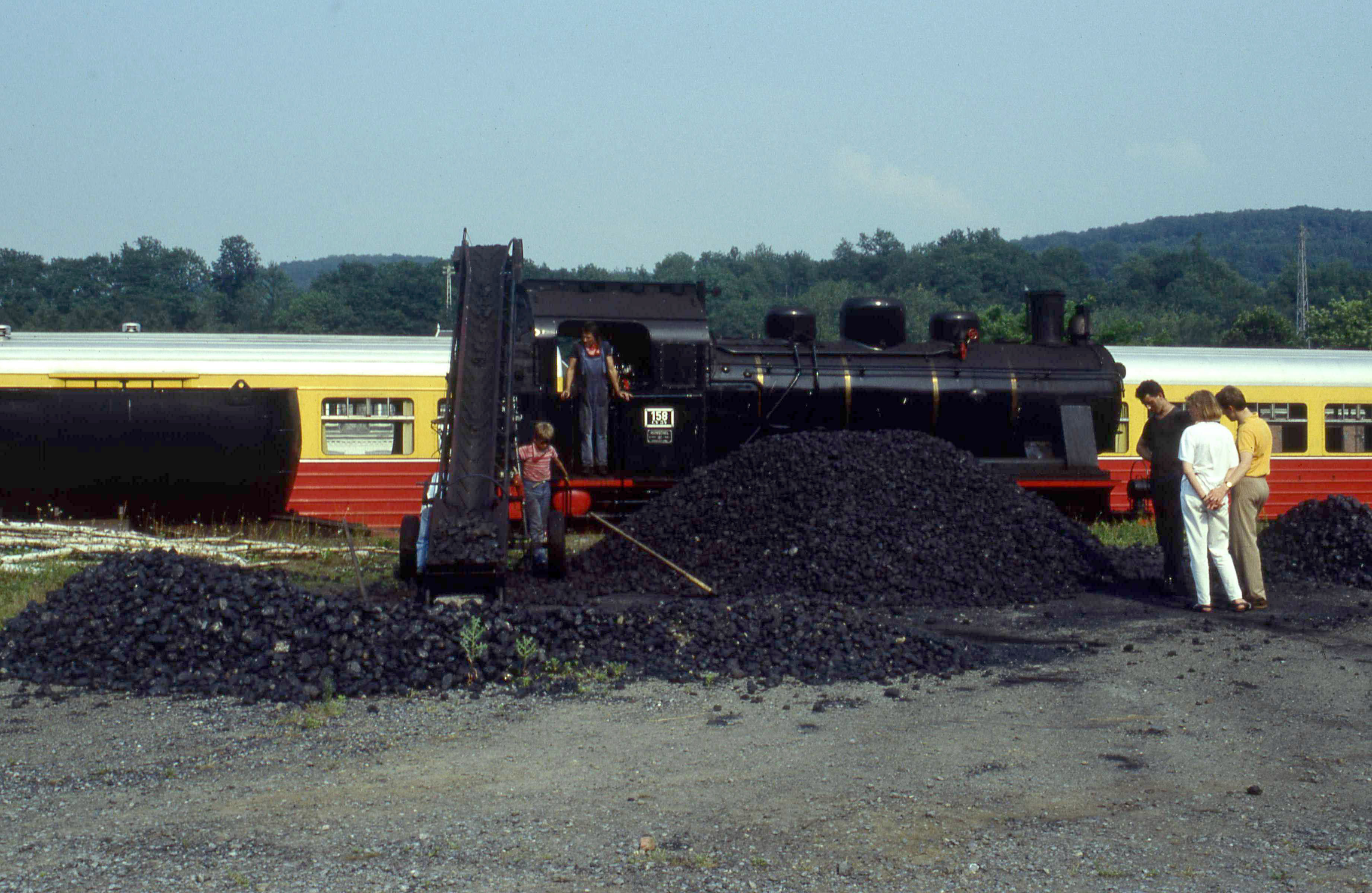 In 1992 exploiteerde de CFV3V nog de spoorlijn Dinant Givet. Hiervoor hadden ze een eigen stelplaats in station Heer-Agimont ingericht. Hier wordt de stoomloc 158 van kolen voorzien.